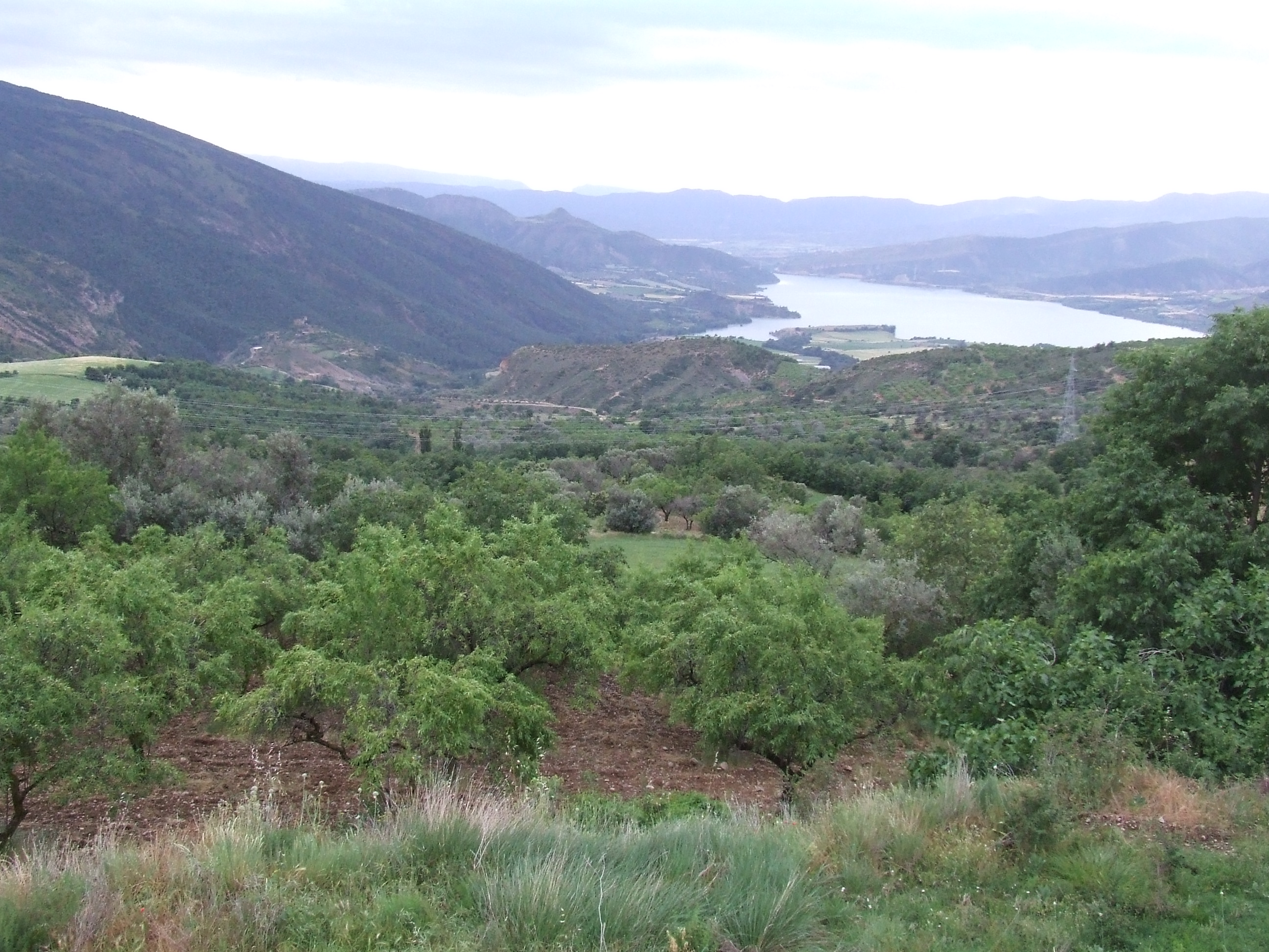 El terme d'Aramunt des de Pessonada (Conca de Dalt, Pallars Jussà)